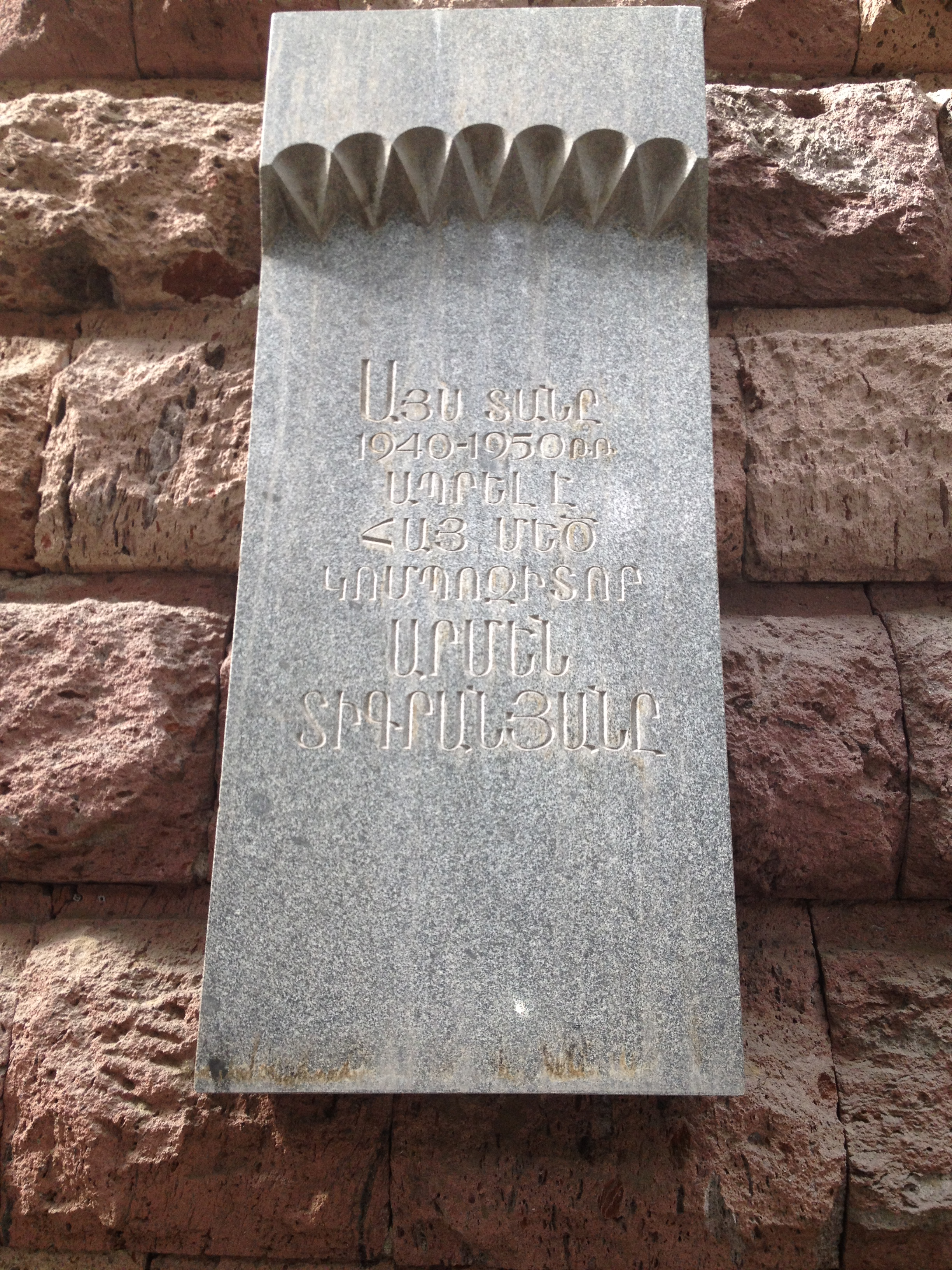 Plaque à Erevan.